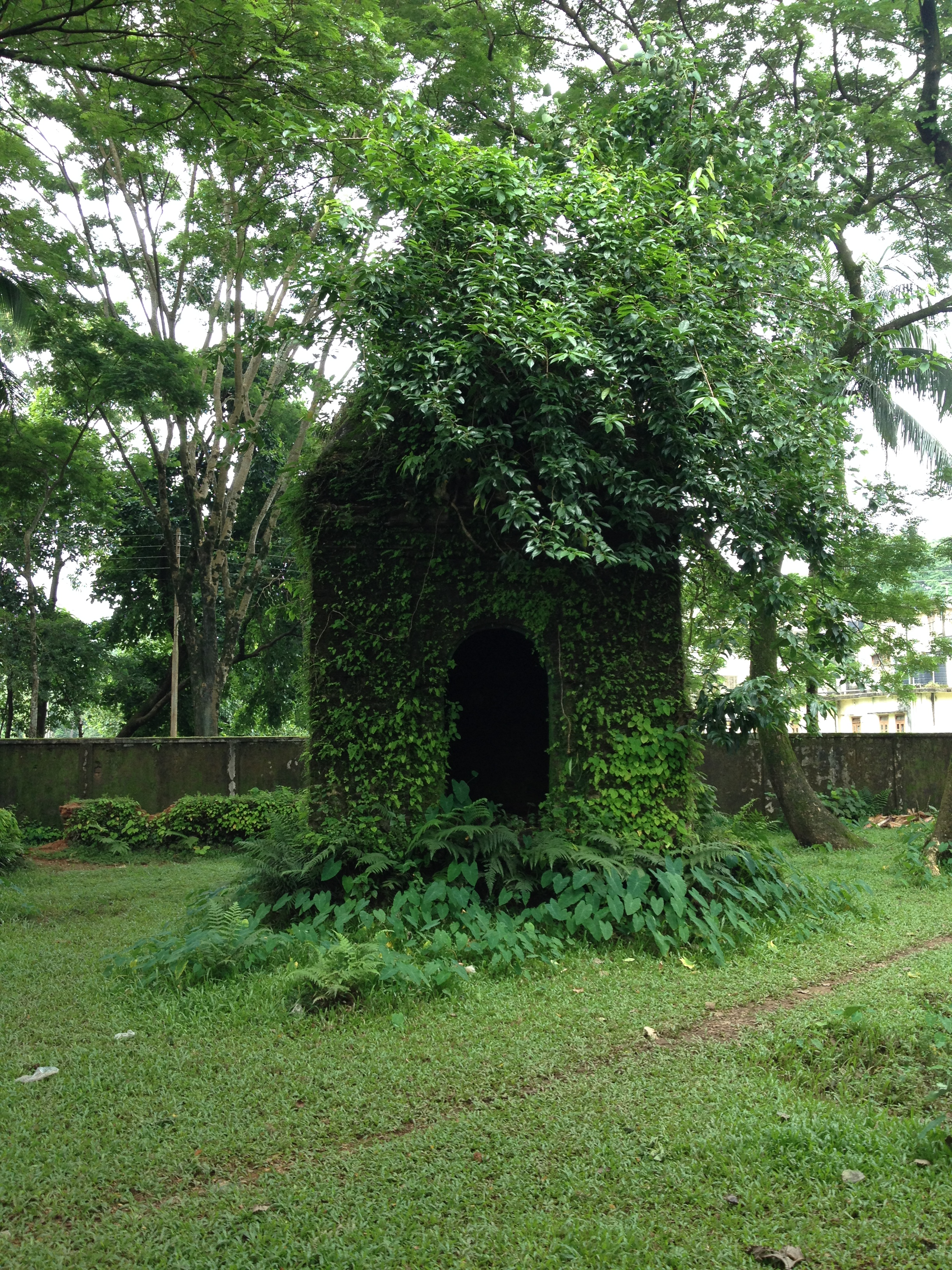 জয়েন্তশ্বরী বাড়ি